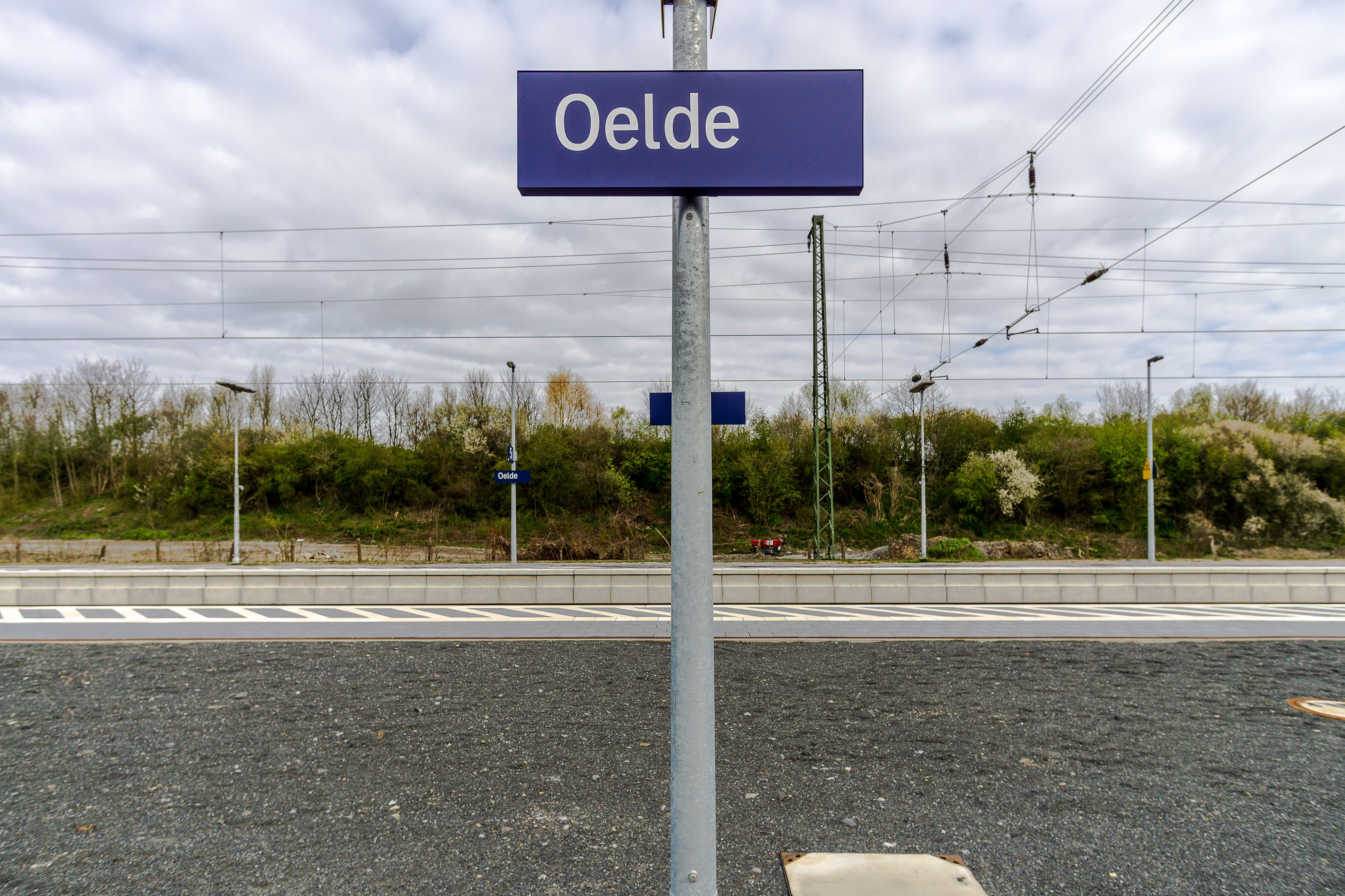 Bahnhofsschild am Bahnsteig in Oelde